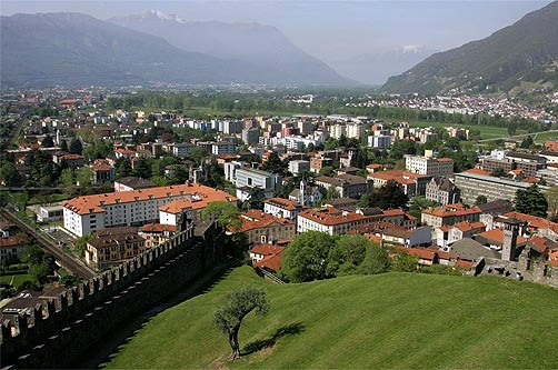 Ausblick vom Castello Montebello (Bellinzona)